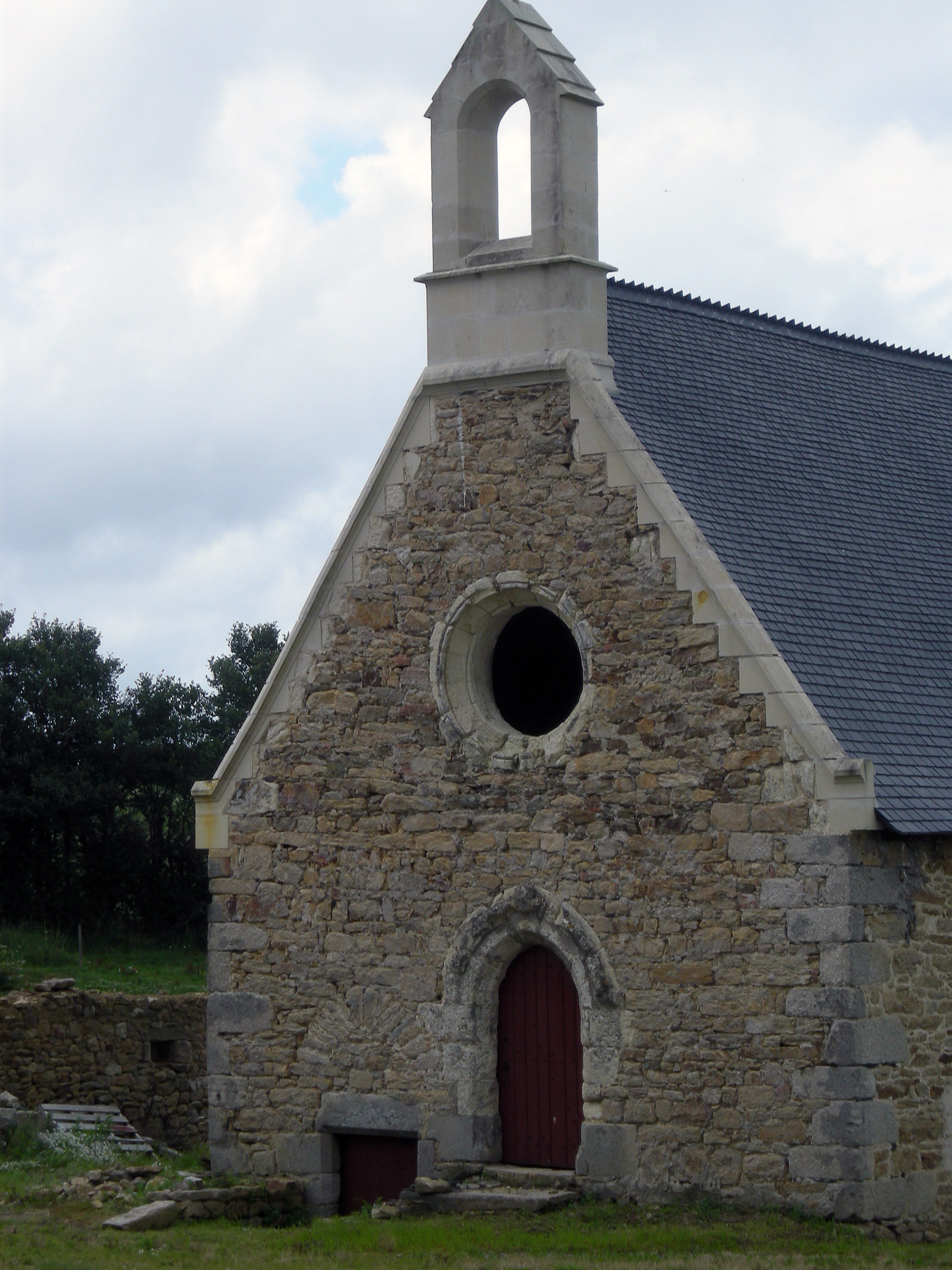 La chapelle de Bavalan en rénovation en été 2012